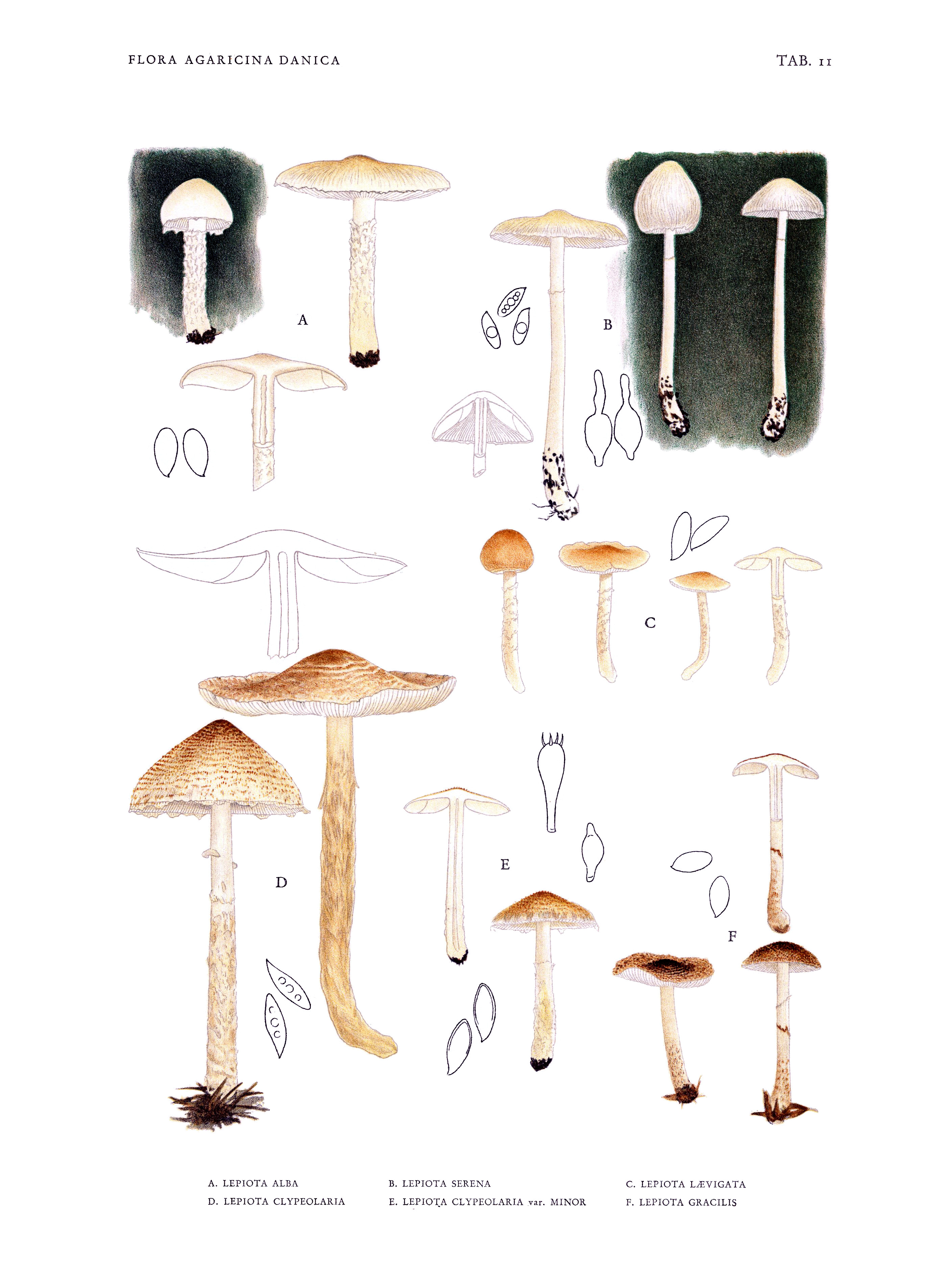 Jakob E. Lange: Flora agaricina Danica. Vol. 1; TAB. 11 A. Lepiota erminea as Lepiota alba B. Leucoagaricus sericifer as Lepiota serena ss Lange C. Lepiota oreadiformis as Lepiota laevigata ss Lange D. Lepiota clypeolaria E. Lepiota clypeolaria var. minor F. Echinoderma gracilis